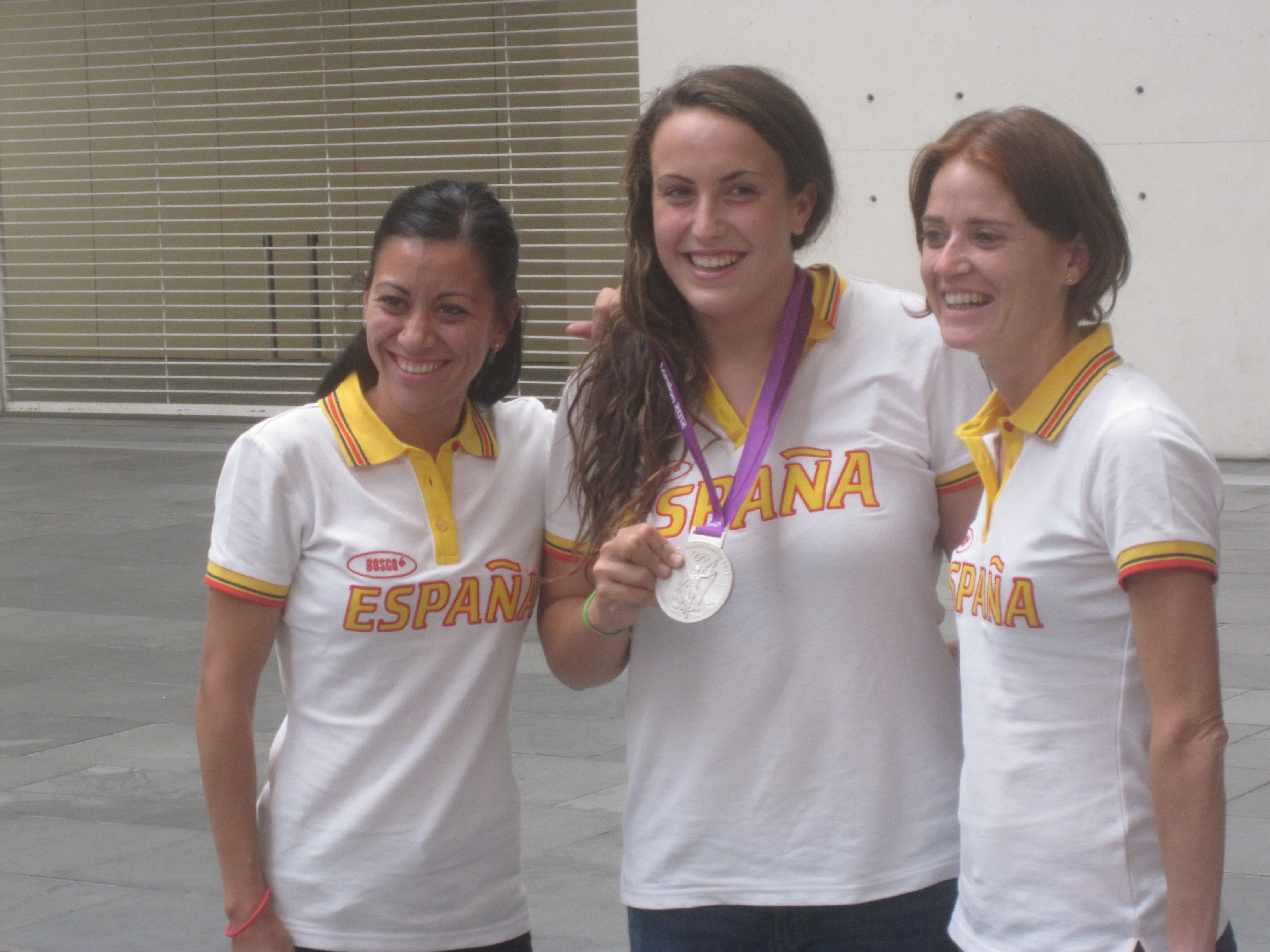 Andrea Blas con su medalla de plata ganada en los JJ.OO. de Londresm 2012.